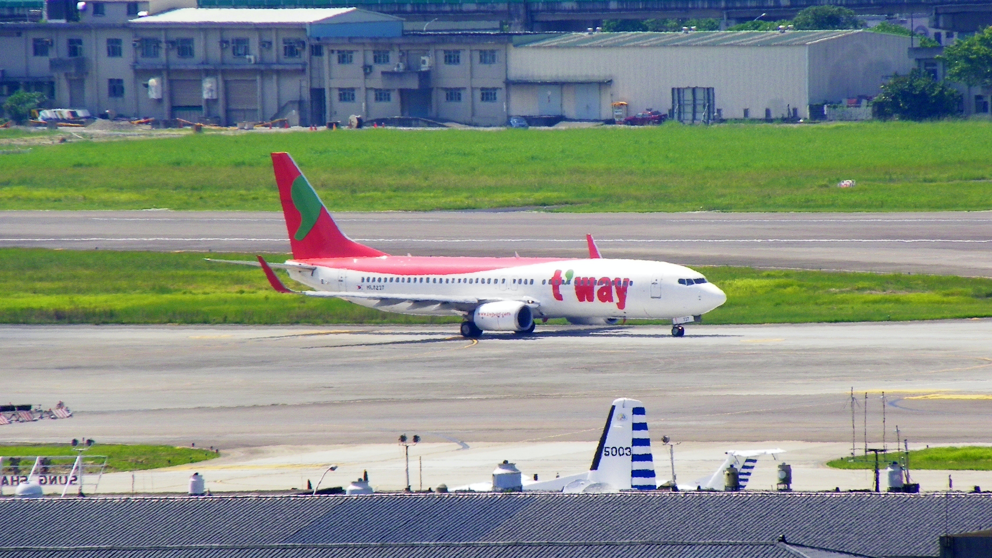 南韓德威航空波音737-800客機於臺北松山機場停機坪往東移動，準備進入跑道東端起飛位置。